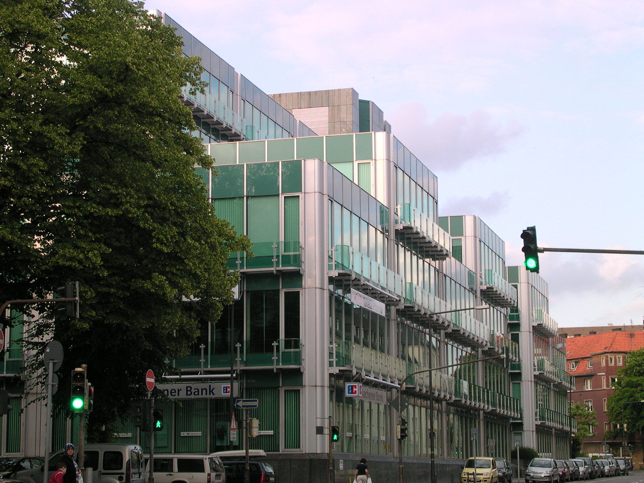 Aachen, Vegla-Haus, Saint-Gobain-Verwaltungsgebäude an Bismarckstraße und Viktoriaallee